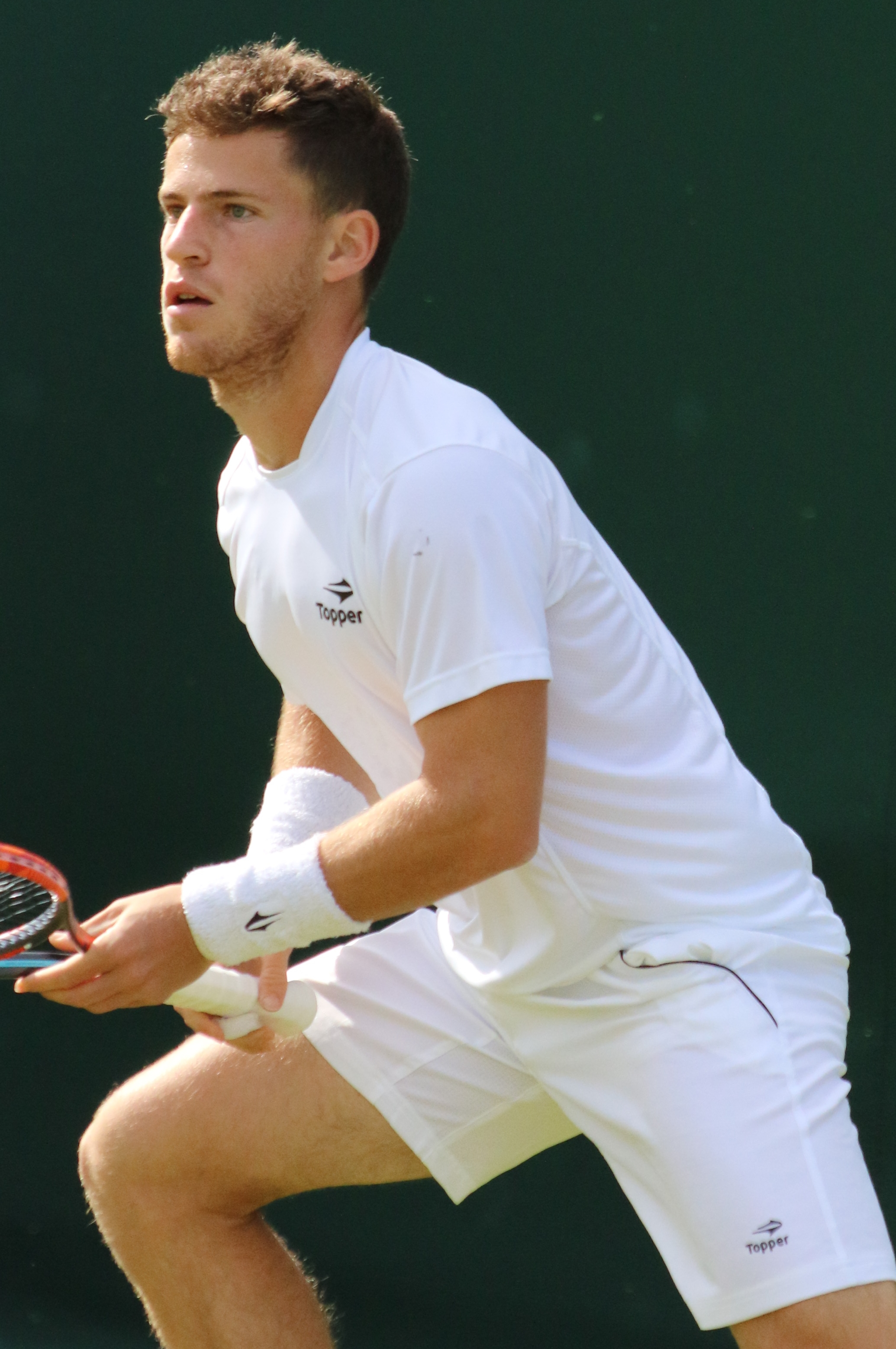 Schwartzman WM16 (13)